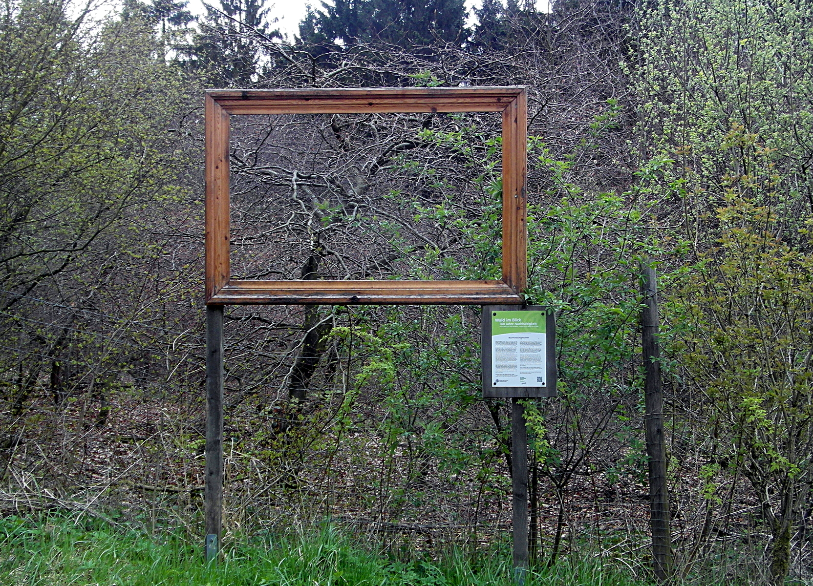 Die Niedersächsischen Landesforsten präsentieren auf diese Art einen Bestand an Süntelbuchen in der Försterei Köllnischfeld des Forstamtes Saupark. Nachdem im 19. Jahrhundert die Süntelbuchenbestände im Süntel weitgehend vernichtet wurden, wurden seit den 1970er Jahren an mehreren Orten im Sünteltal, hier im Deister südlich der Siedlung Köllnischfeld, junge Süntelbuchen gepflanzt. Diese waren in einer Baumschule durch Pfropfung vermehrt worden.